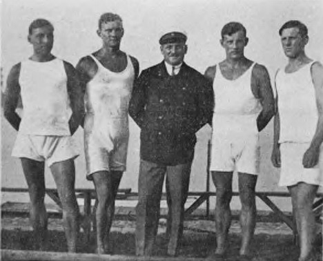 Czwórka ze sternikiem klubu KW Wisła Warszawa. Od lewej: Edmund Kowalec, Józef Szawara, sternik Hoffmann, Antoni Brzozowski, Henryk Fronczak. Wszyscy - oprócz sternika Hoffmanna - reprezentowali Polskę na Igrzyskach Olimpijskich w Paryżu w 1924, w konkurencji czwórki ze sternikiem (towarzyszył im sternik Nadratowski).